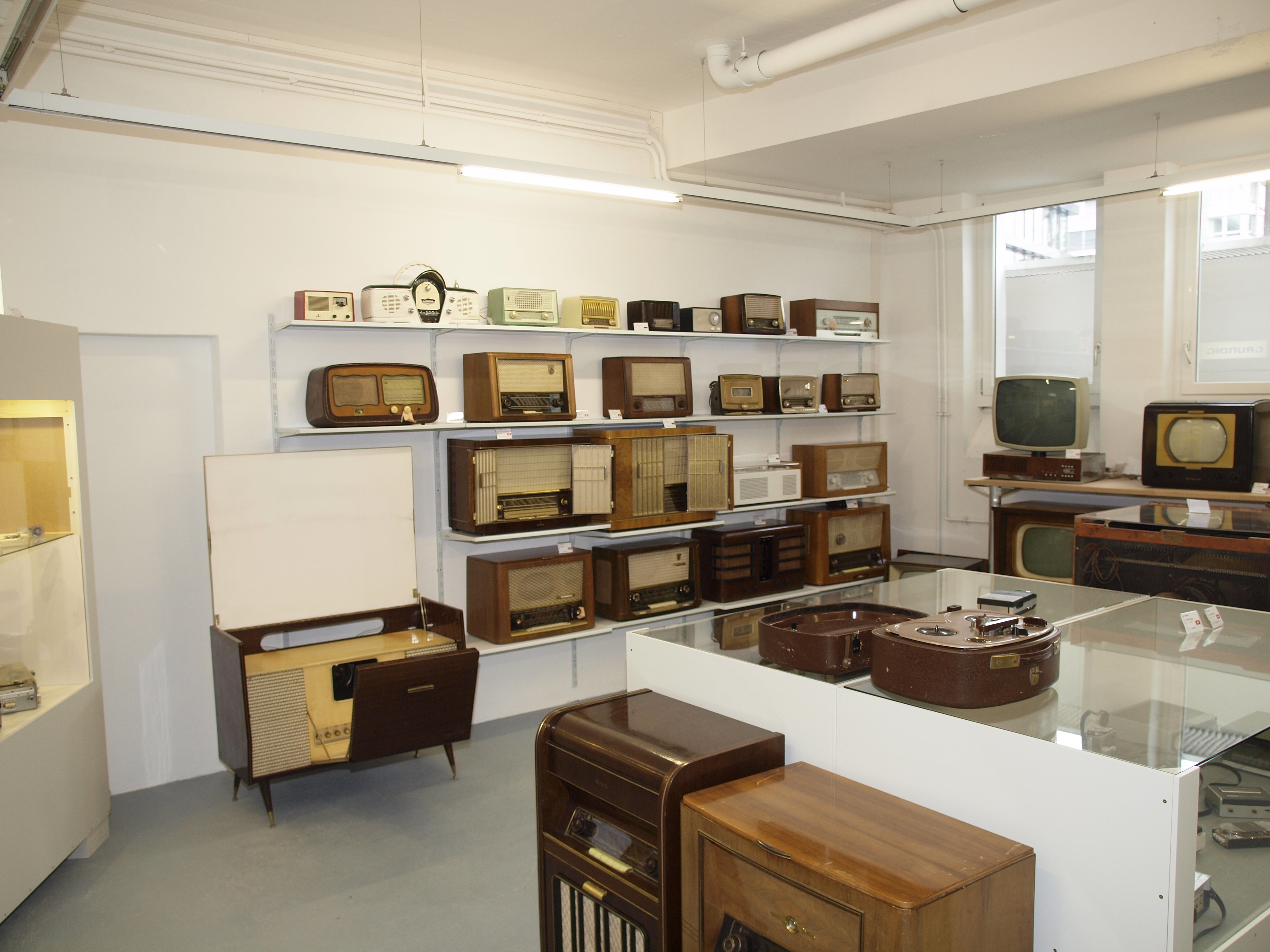 Ein Teil der Rundfunkgeräte, die im Mueum Enter in Solothurn ausgestellt sind.